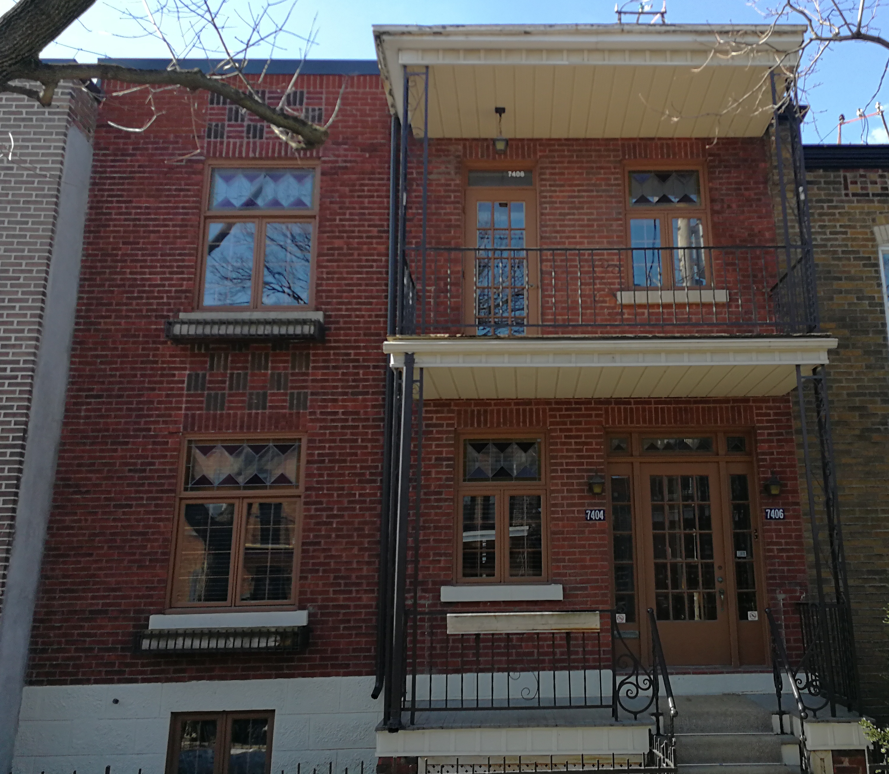 7406 rue Drolet, maison où naquit Claude Léveillée le 16 octobre 1932 dans le quartier Villeray à Montréal